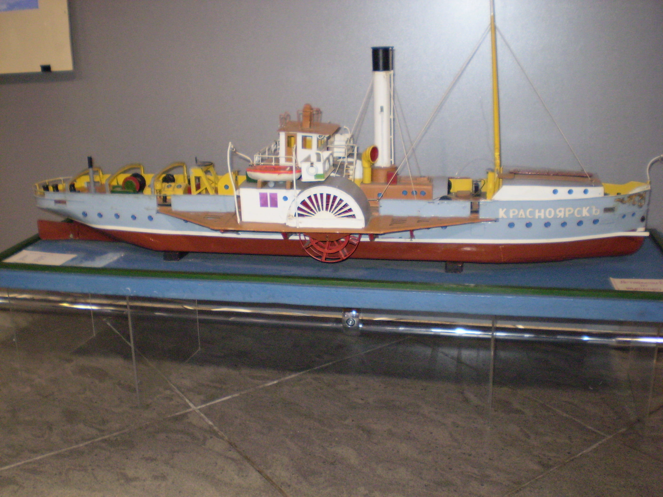 Макет парохода "Красноярск" 1905 - 1909. Красноярский краеведческий музей.